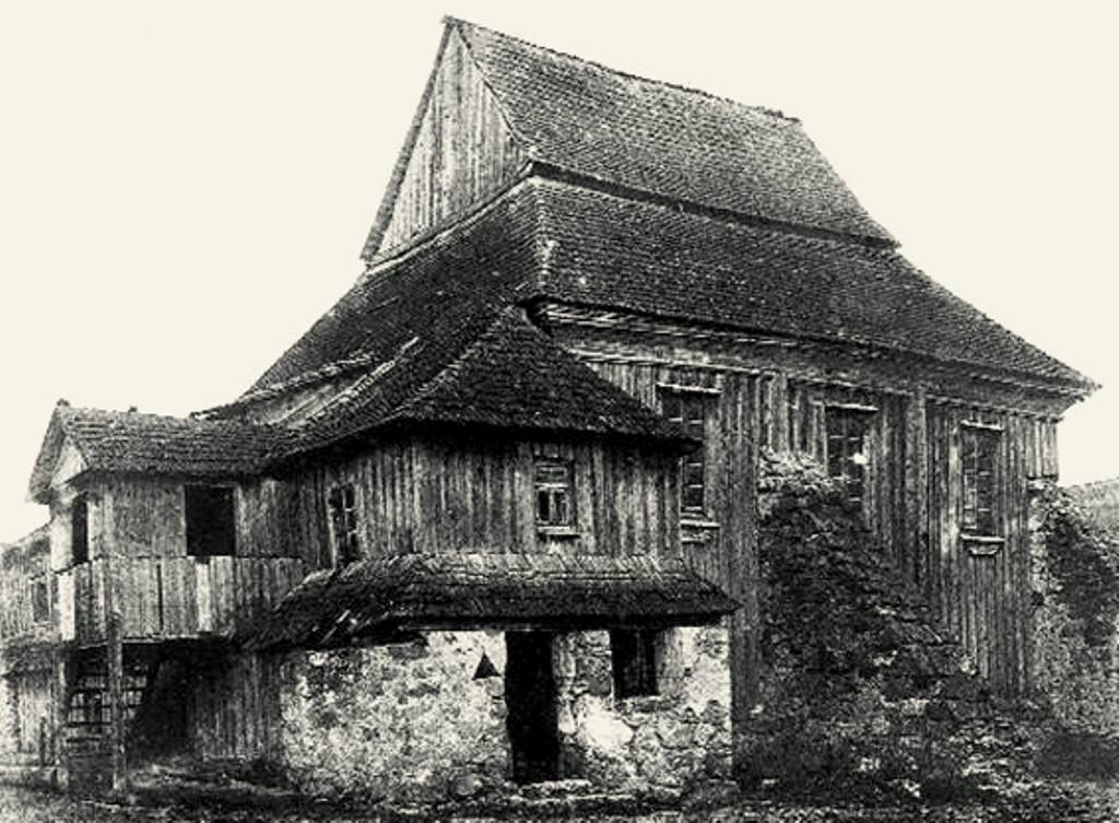 Деревянная синагога в Миньковцах, Подольская губерния